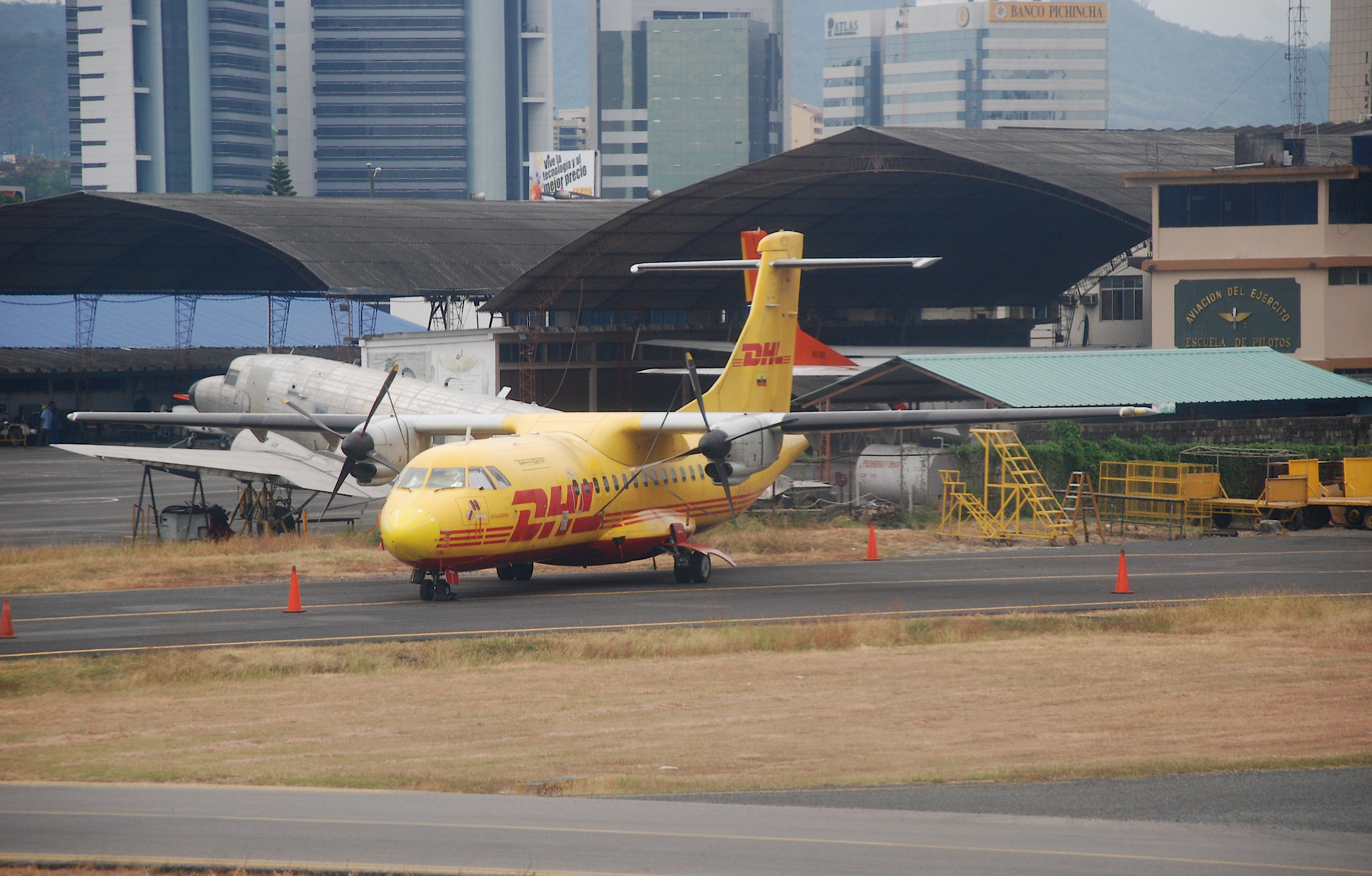 ATR-42-300 DHL (Trans Am Aero Express del Ecuador) [HC-CDX]